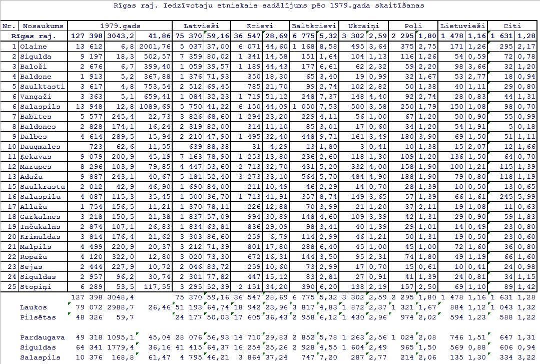 Latvijas 1979. gada tautas skaitīšanas dati